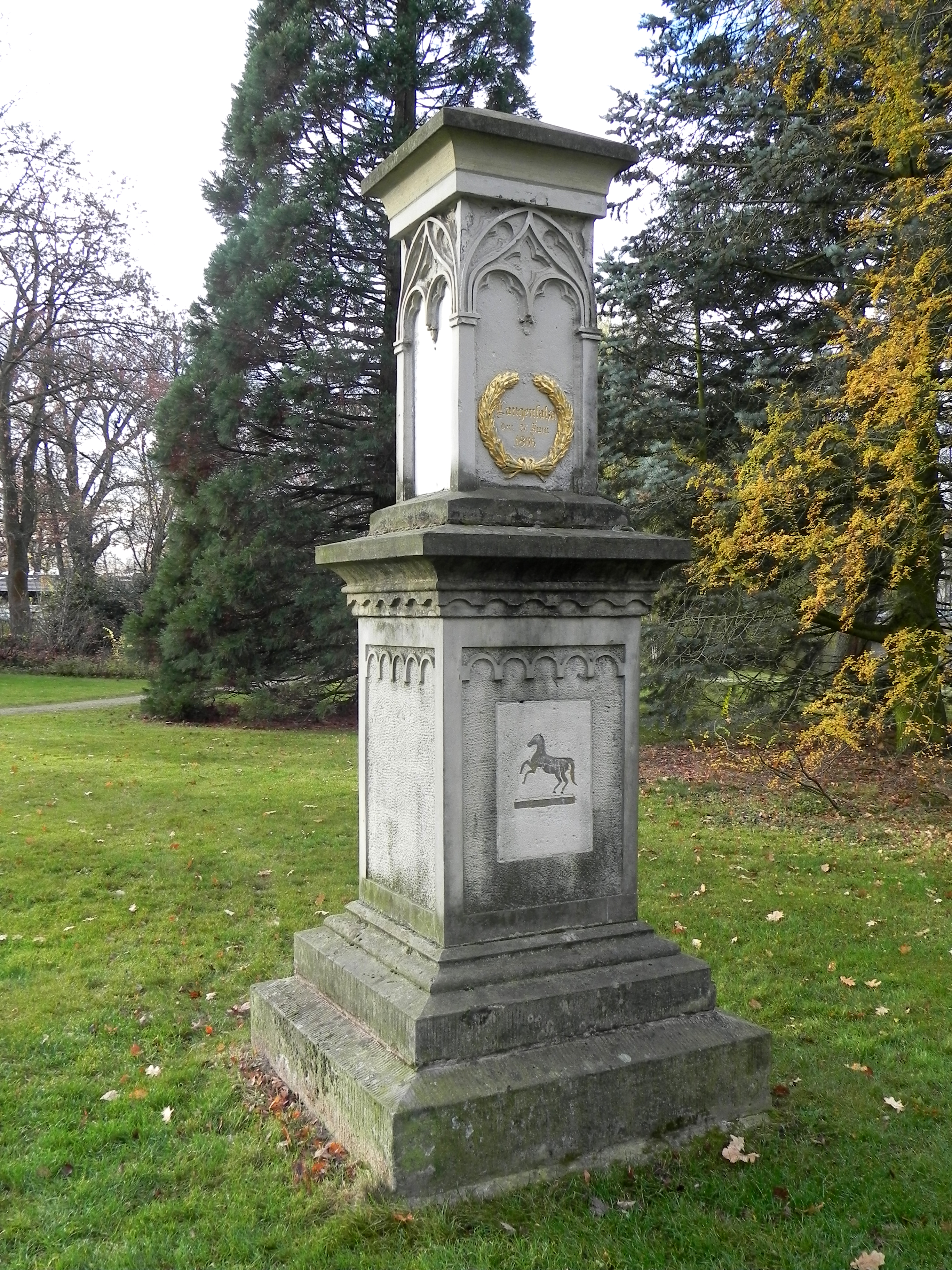 Denkmal im Französischen Garten Celle (Niedersachsen), zur Erinnerung an die Schlacht bei Langensalza (1866). Das Denkmal wurde 1869, einen Tag nach seiner Aufstellung, zerstört und 1920 wieder aufgebaut.